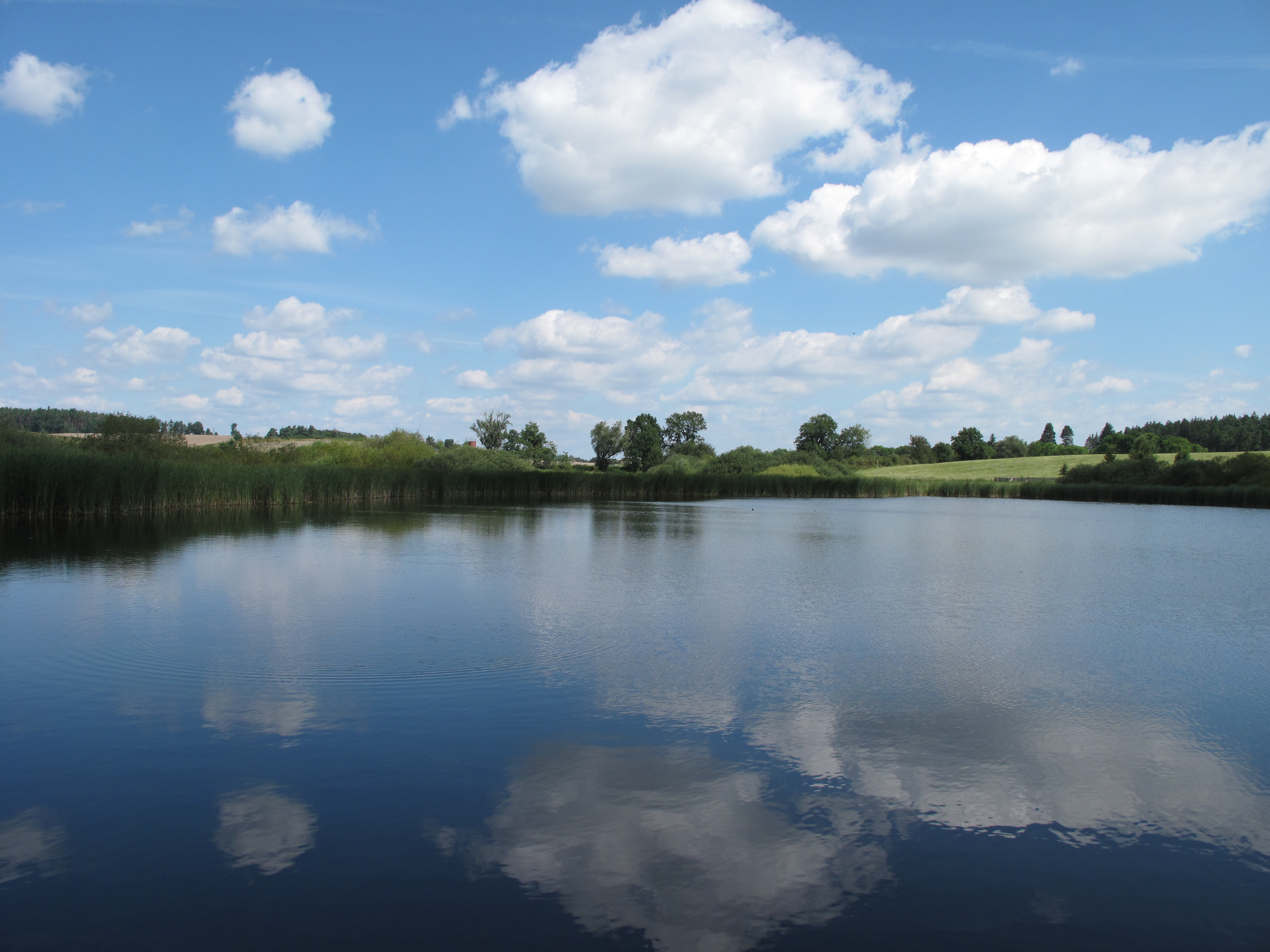 Purkratice, Postřední rybník, pohled